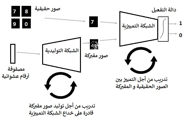 تتكون شبكة الخصومة التوليدية من مكونين: شبكة توليدية و شبكة تمييزية انطلاقا من مصفوفة من الأرقام العشوائية، تتولى الشبكة التوليدية إنشاء صورة جديدة عبر عدد من التحويلات بينما يكون دور الشبكة التمييزية، هو التمييز بين صور حقيقية و الصور المفبركة التي تنتجها الشبكة التوليدية